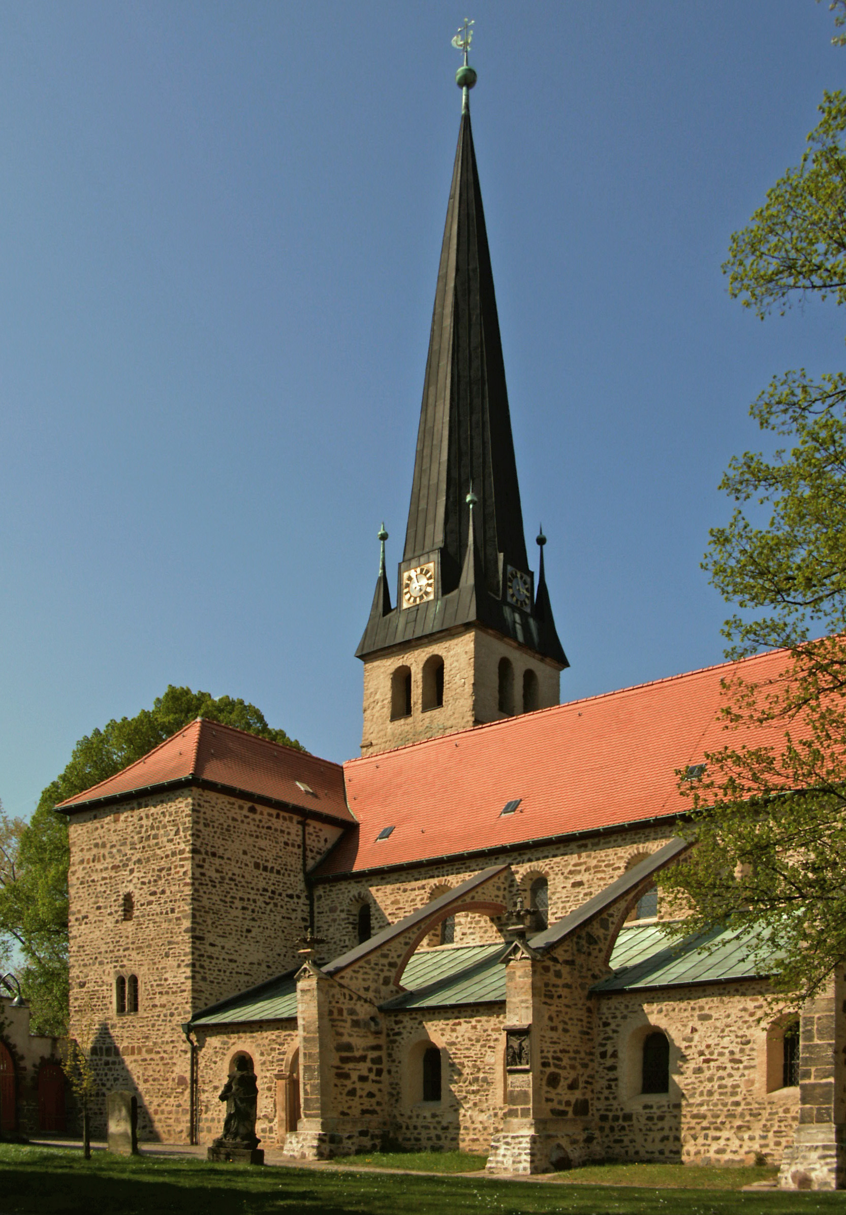 Katholische Kirche St. Peter und Paul in Groß Ammensleben, Landkreis Börde